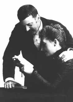 Karl Wittgenstein and his wife Leopoldine (1847-1913)